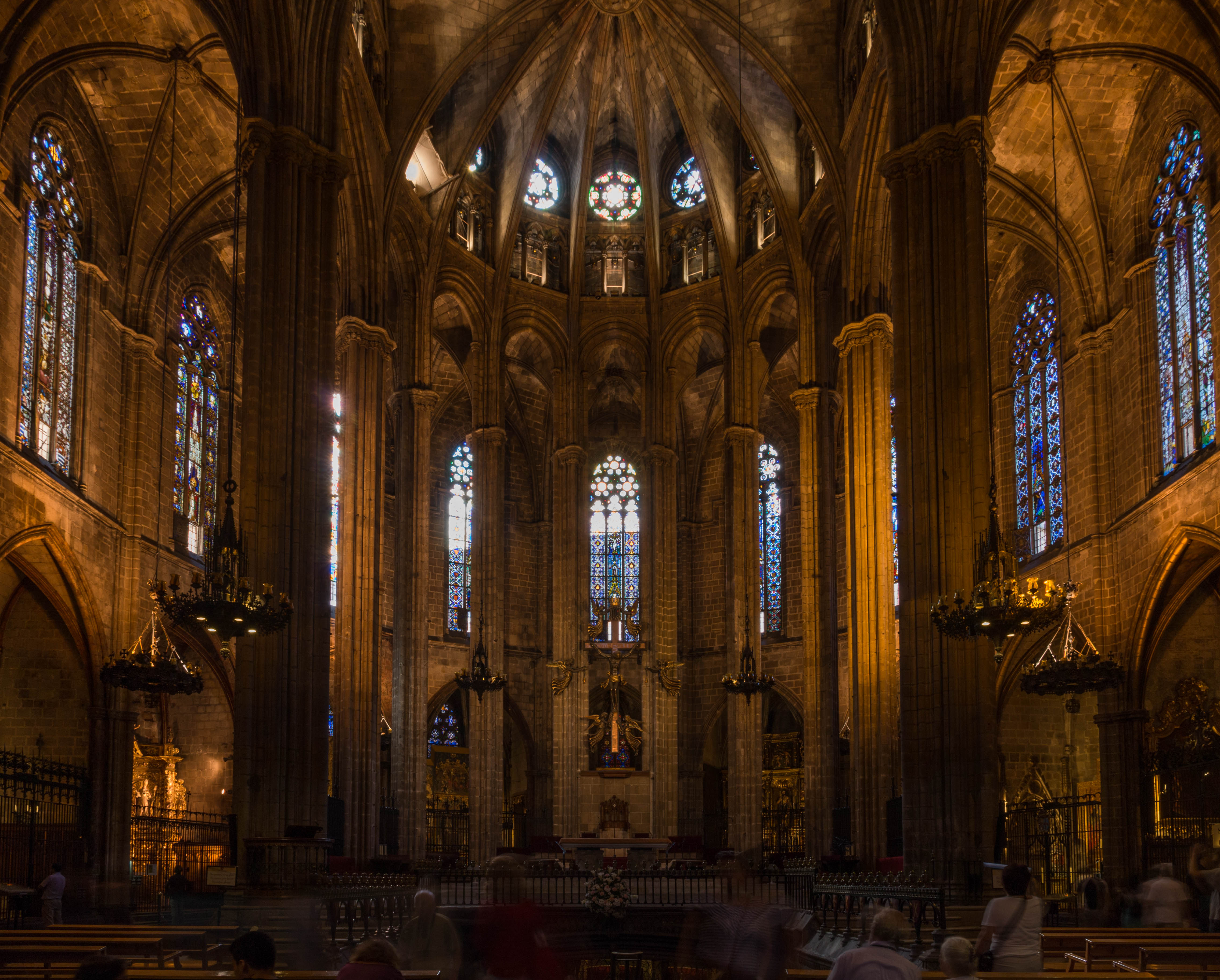 Altar der Kathedrale von Barcelona